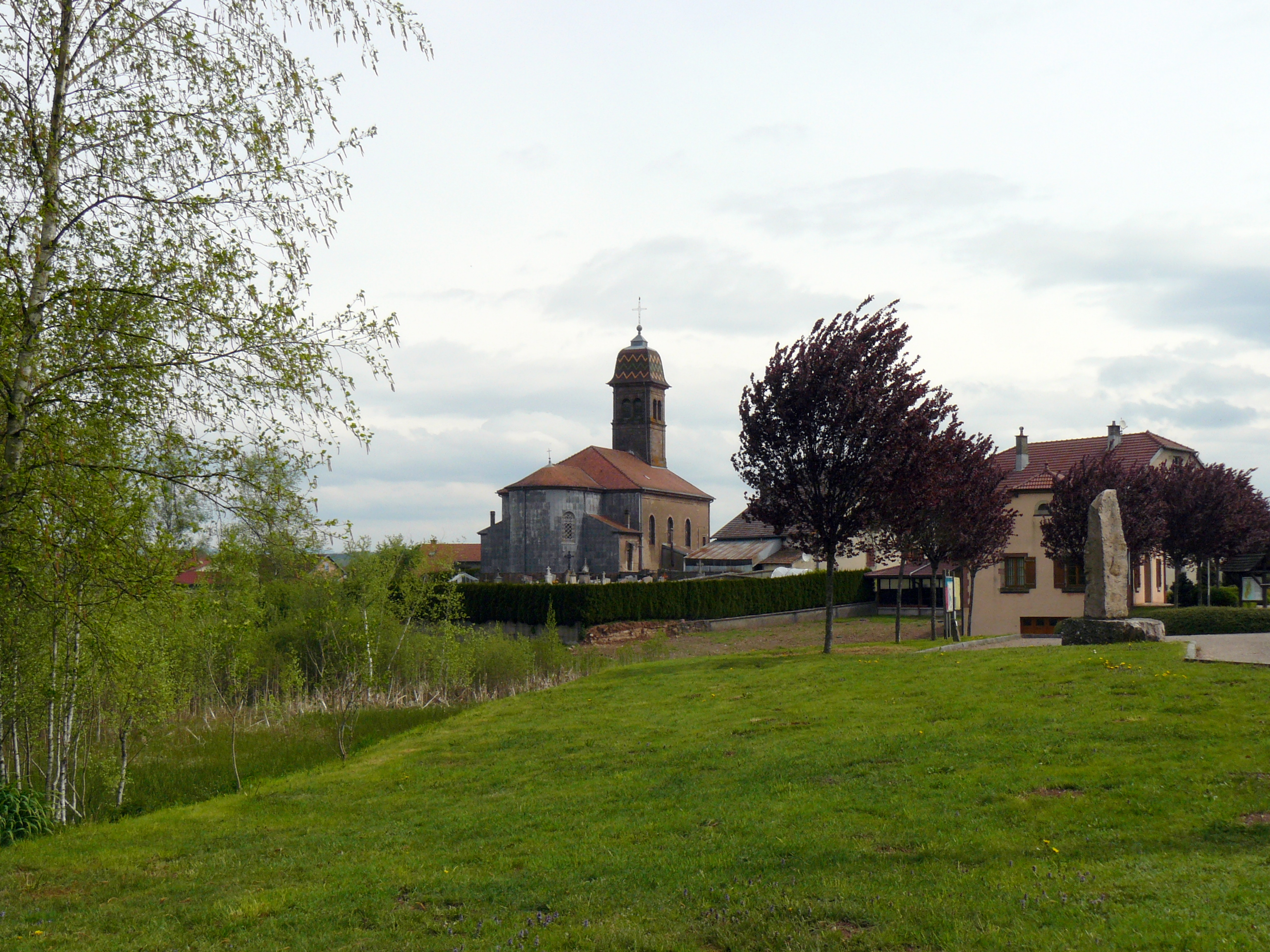 Vue d'Ecromagny (Haute-Saône, France)